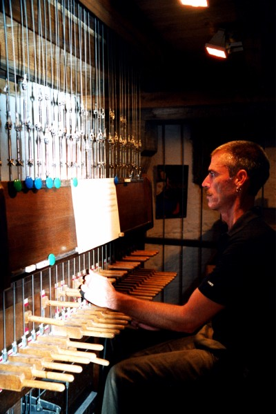 Carillonneur Brian Swager (San Francisco, California, USA) plays the carillon of the Cathedral Saint John the Baptist (carillon historique Amédée Bollée de la Cathédrale Saint-Jean-Baptiste) in Perpignan, France.